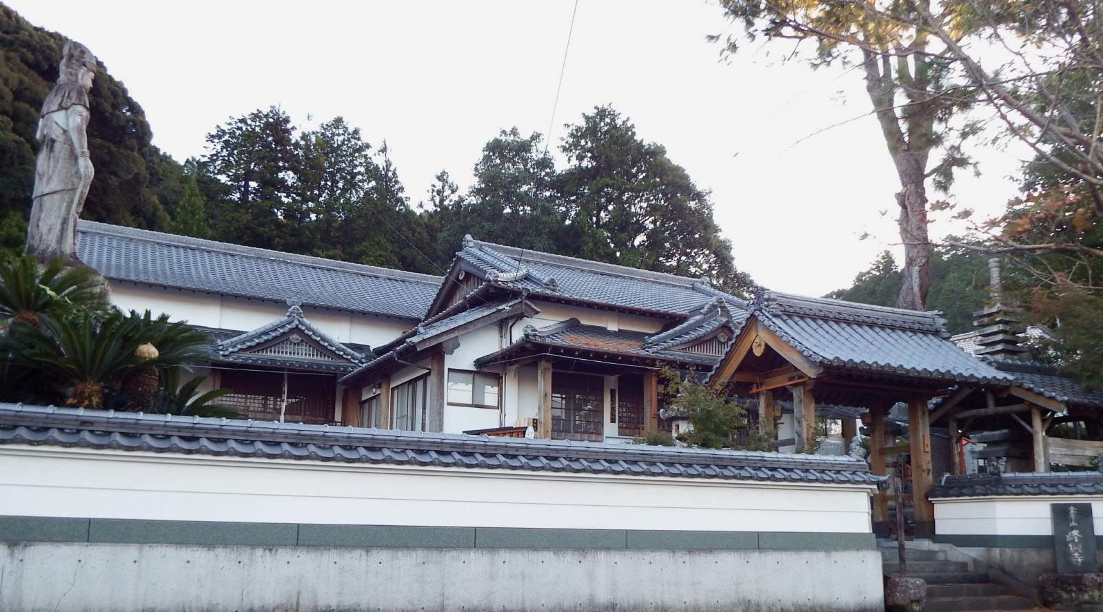 峰興寺の全景